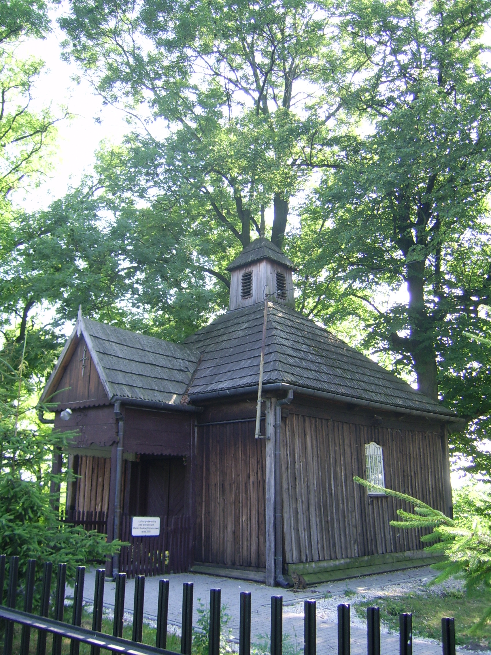 Górka Stogniowska - kaplica p.w. Matki Boskiej Różańcowej, poł. XVIII